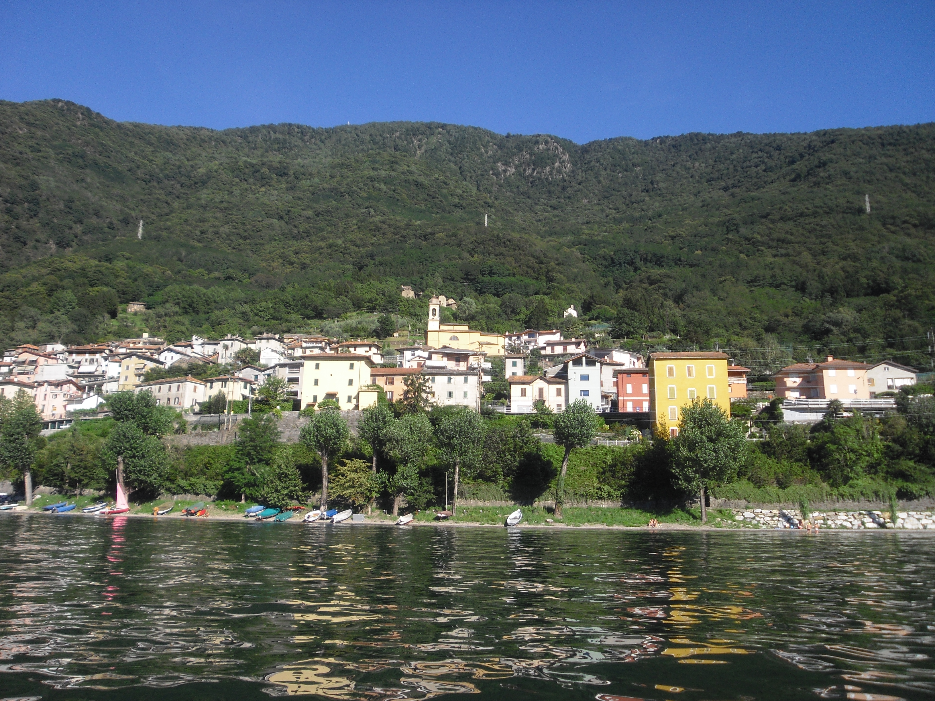 panorama di Dorio (LC) visto dal lago